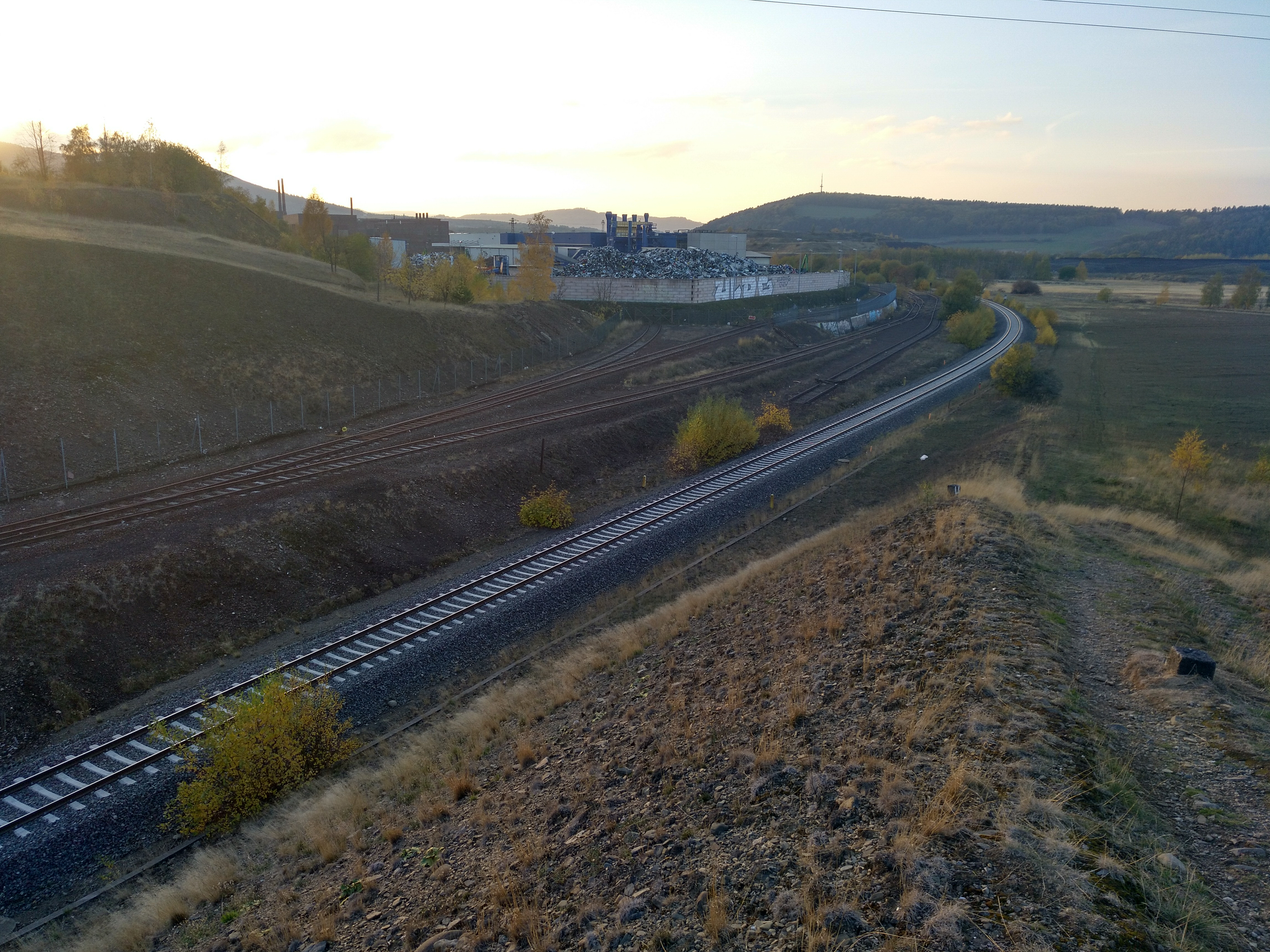 Bahndamm bei Harlingerode nach der Sanierung Ende 2018.